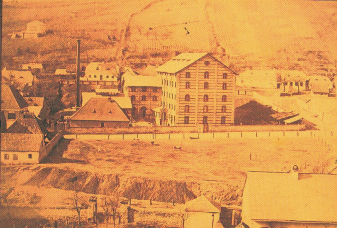 1127*765 KB